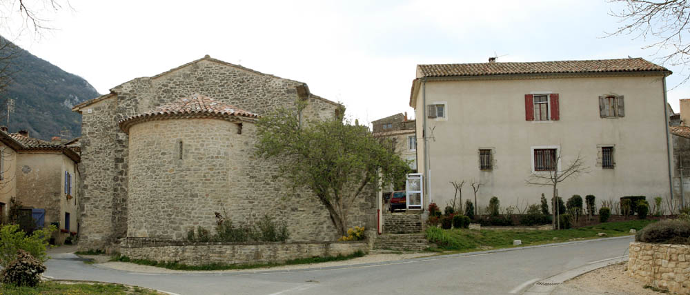 Village of le Castellet-en-Luberon, Vaucluse, France